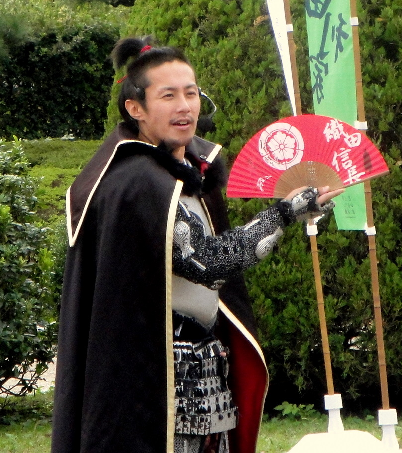 おもてなし武将隊・織田信長役の役者。